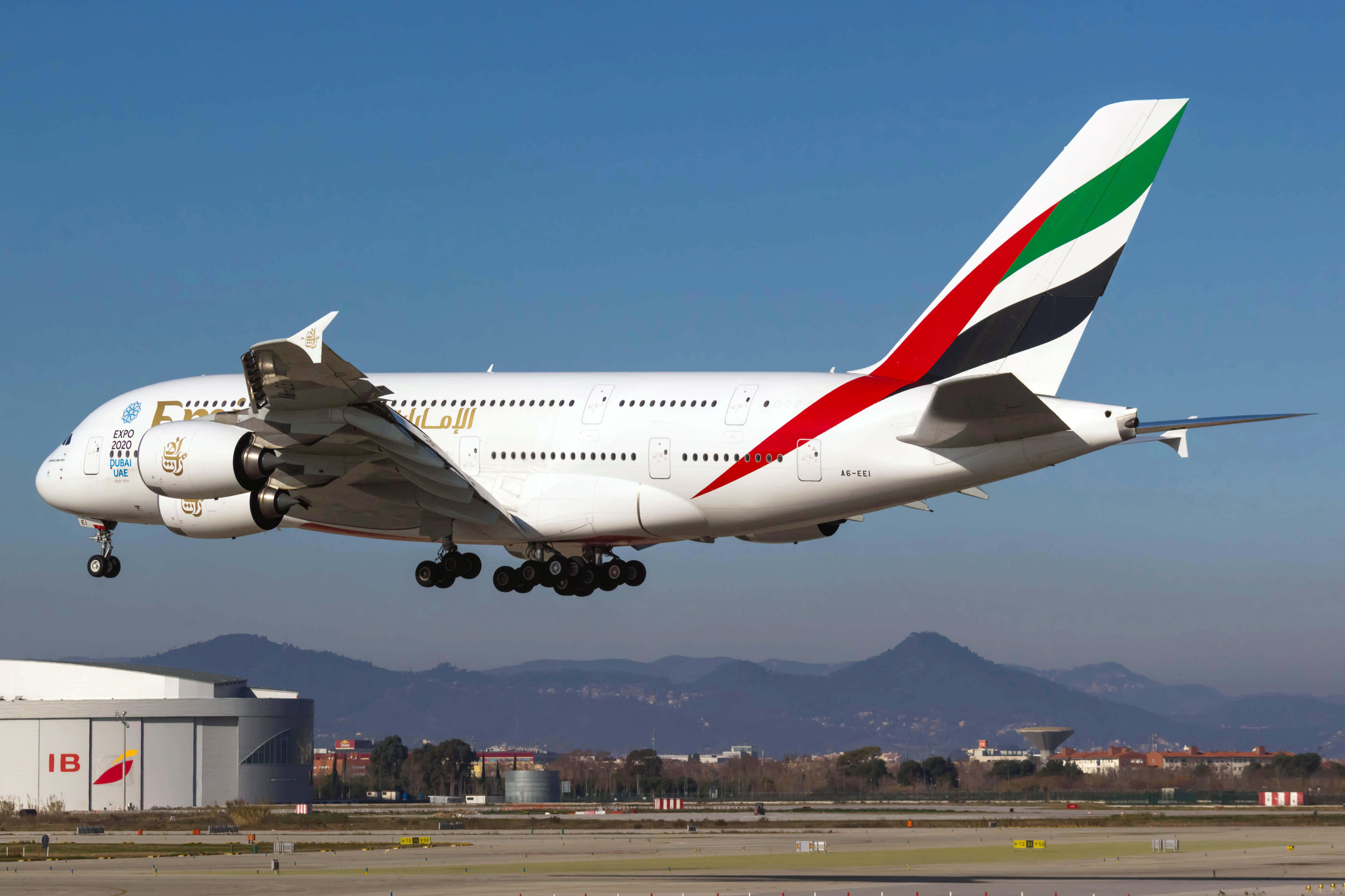 Airbus A380 de Emirates aterrando no aeroporto de Barcelona.